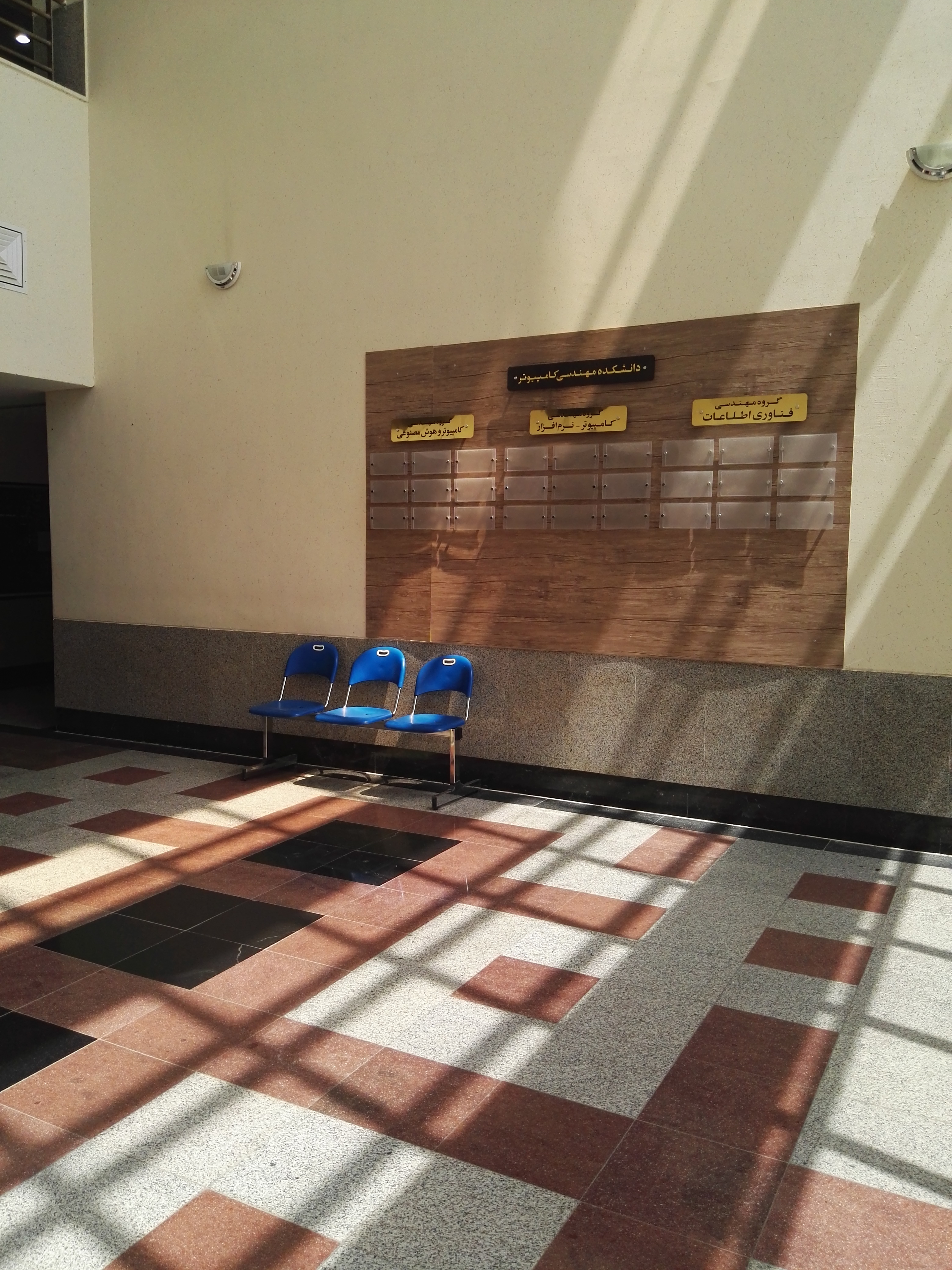 لابی دانشکده کامپیوتر دانشگاه شاهرود